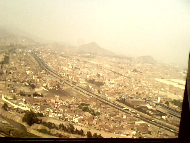 Vista aérea del distrito de Rímac.